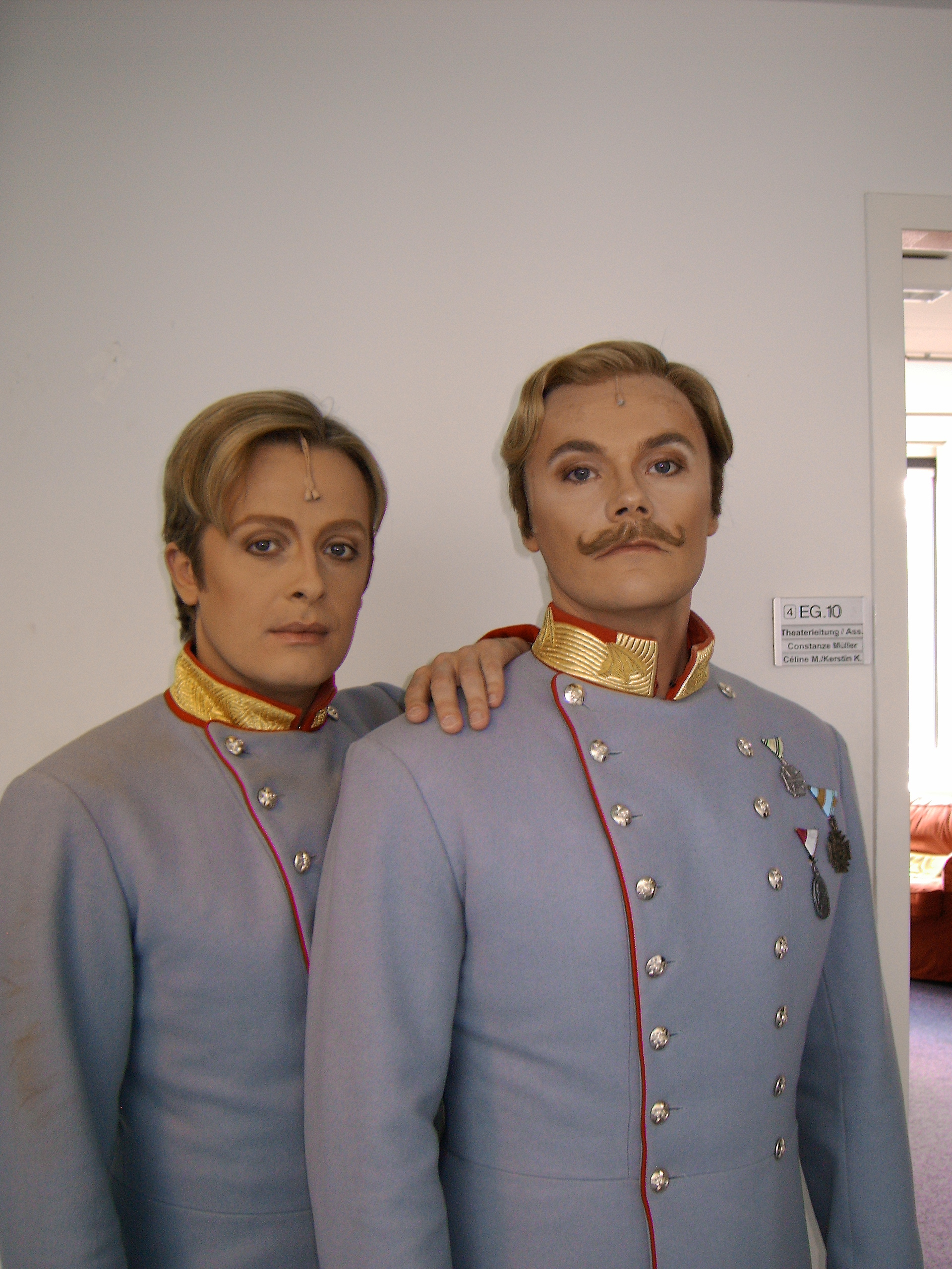 Ross and Haldor Laegreid (as Rudolf and Franz-Joseph)